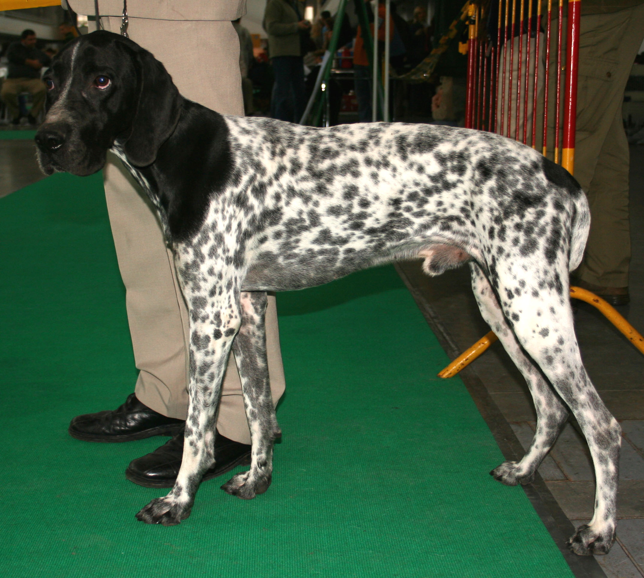 Braque_d'auvergne na Światowej Wystawie Psów Rasowych w Poznaniu